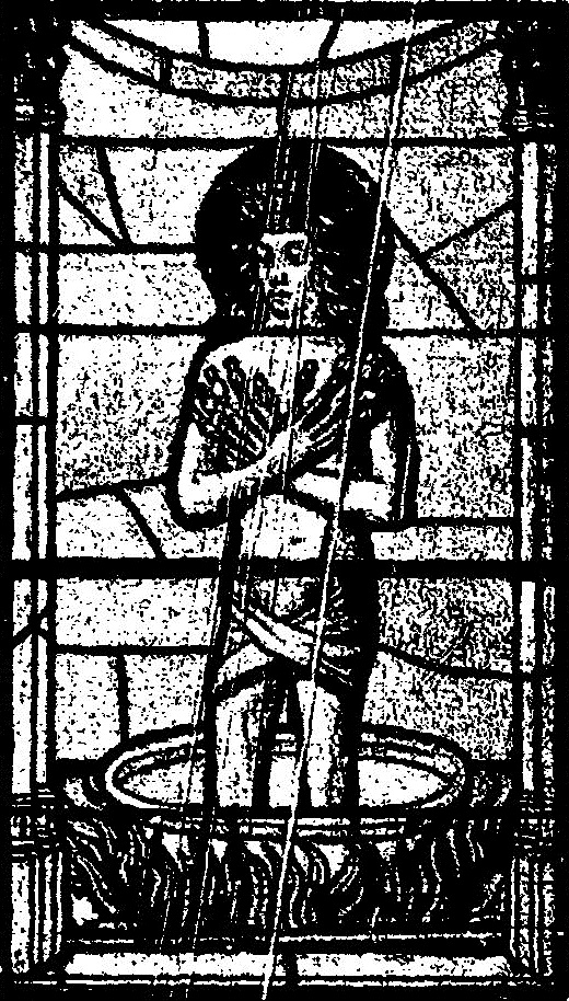 Vitrail de l'église Saint-Nicolas de Beaujeu ; illustre « Les vitraux du Moyen âge et de la Renaissance dans la région lyonnaise », de Lucien Bégule.